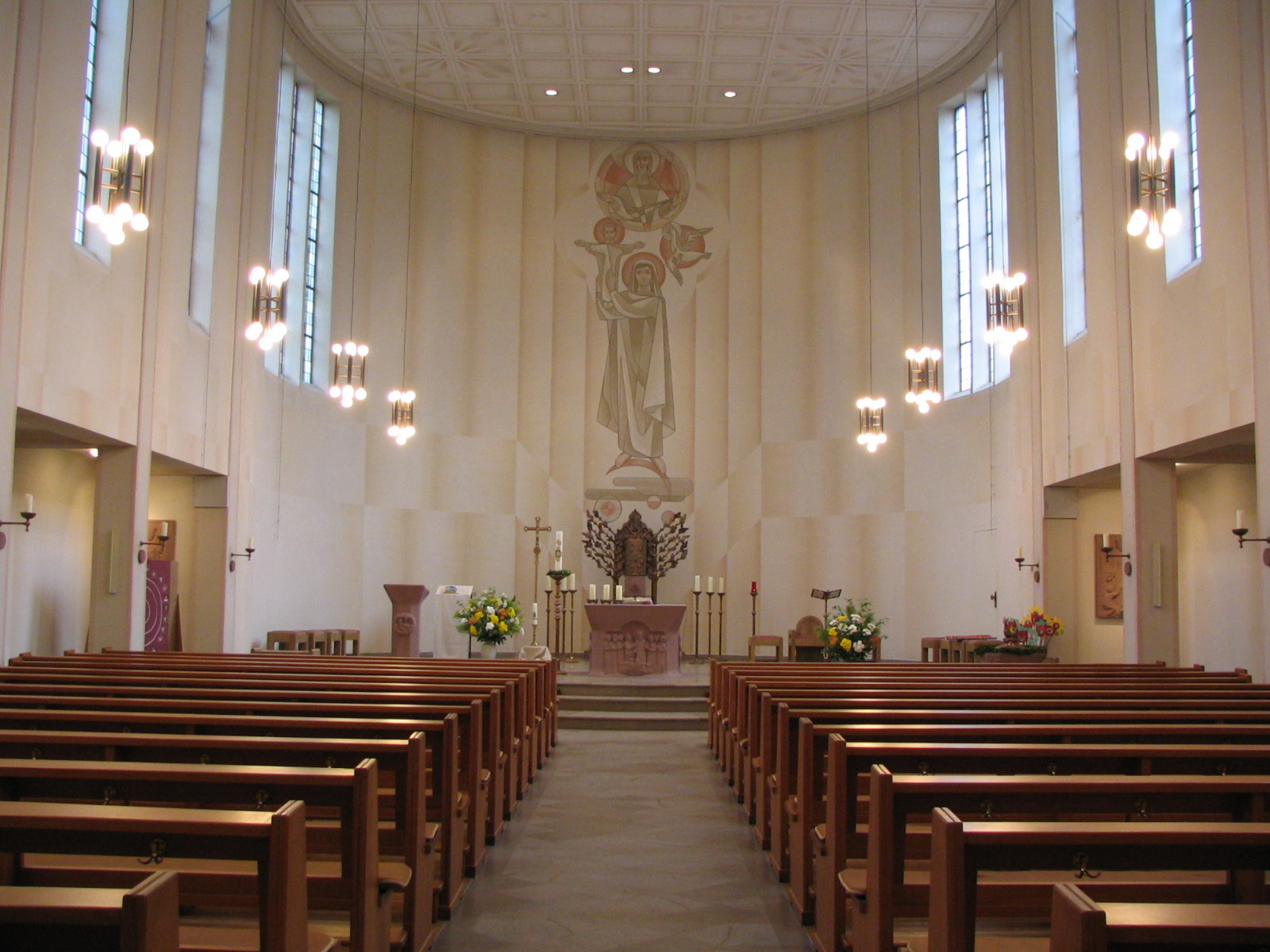 St. Marien, Leer-Loga, Ostfriesland, Deutschland